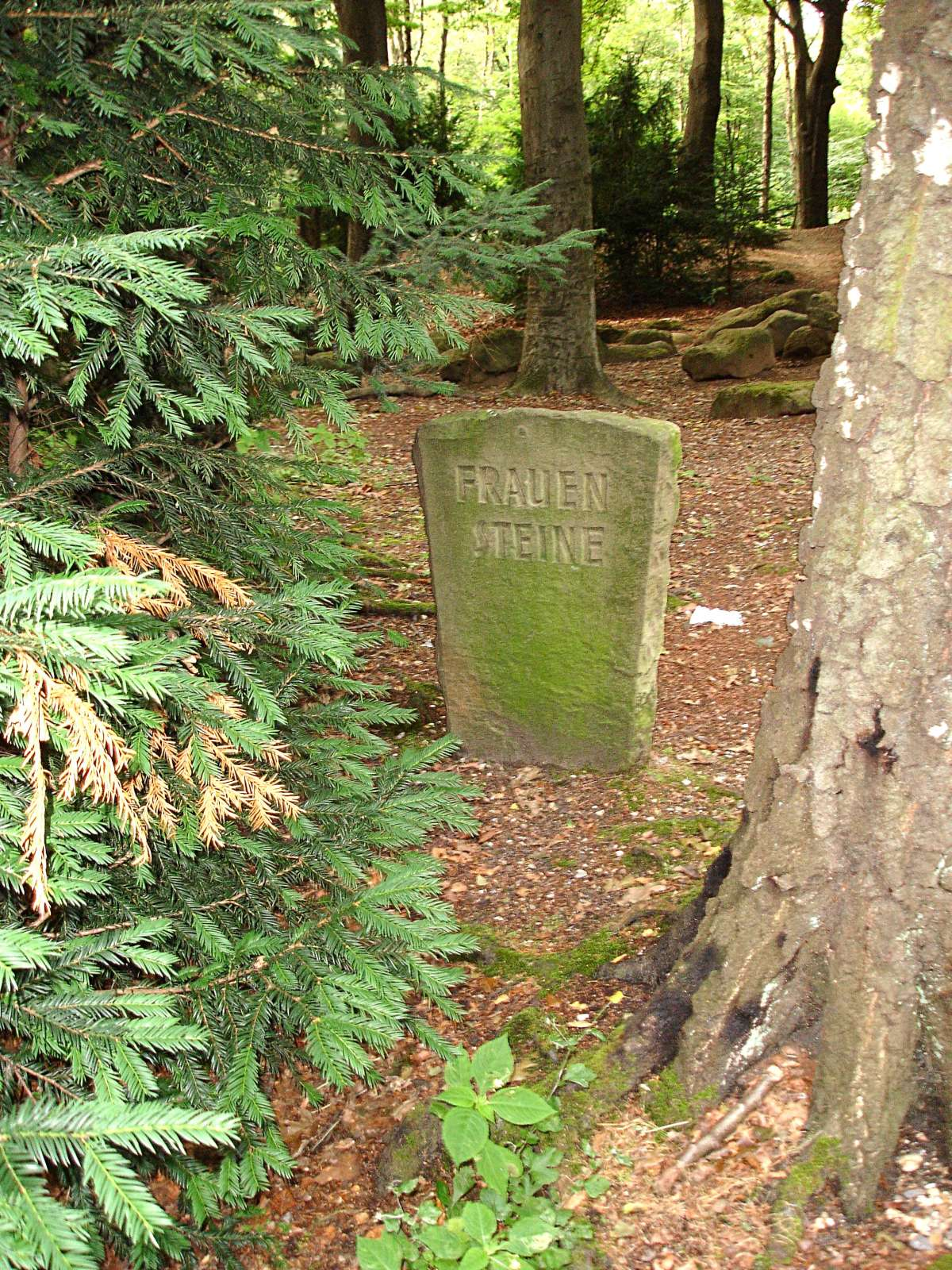 Hinweis auf die "Frauensteine", eine Gesteingruppe im Aaper Wald in Düsseldorf